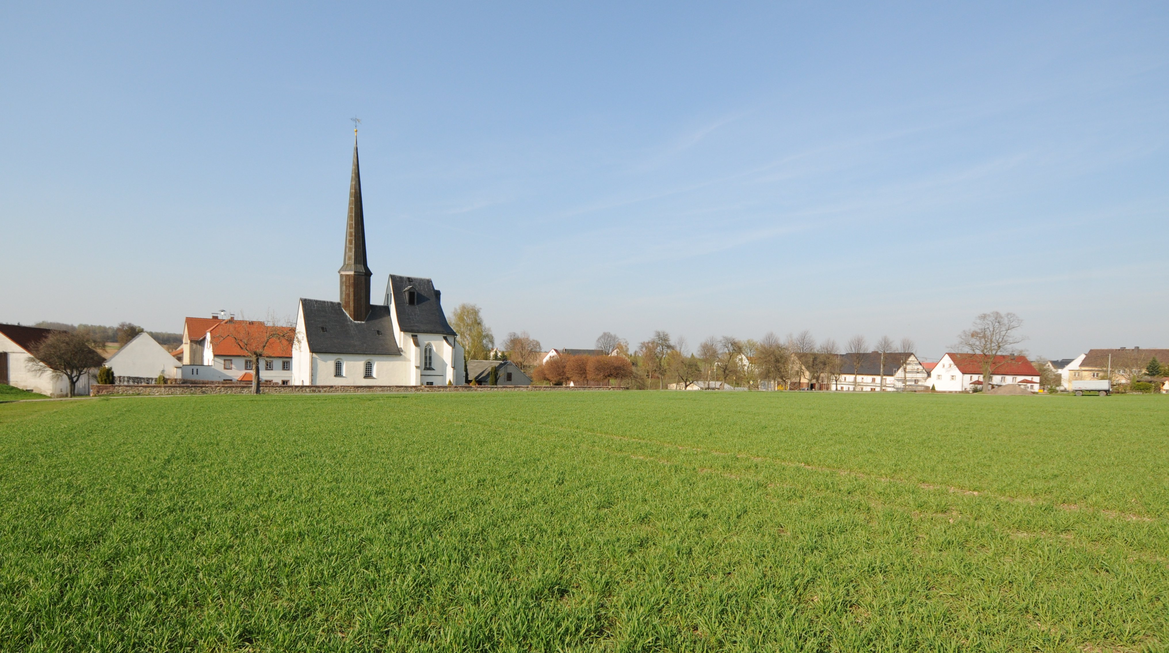 Blick vom Süden auf Jahnshain (Sachsen, Deutschland), Ortsteil von Kohren-Sahlis